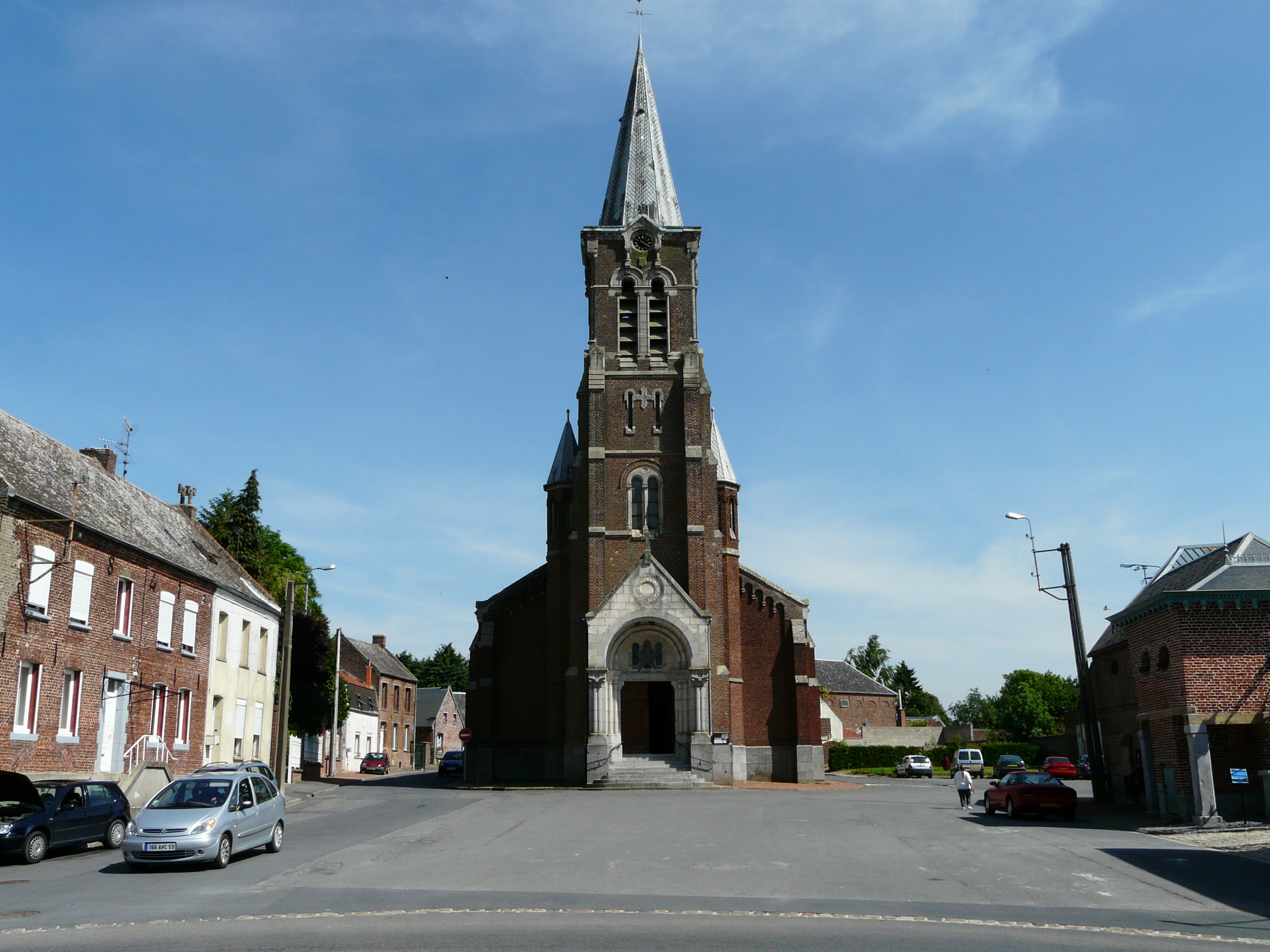 Place de l'église à Béthencourt (Nord, France)